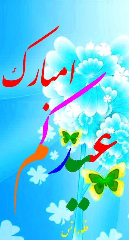 عید سعید